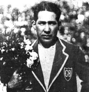 Mario Alborta